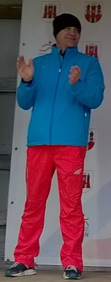 Tomasz Czubak podczas dekoracji IV Biegu BiegamBoLubię bez Granic w Gubinie